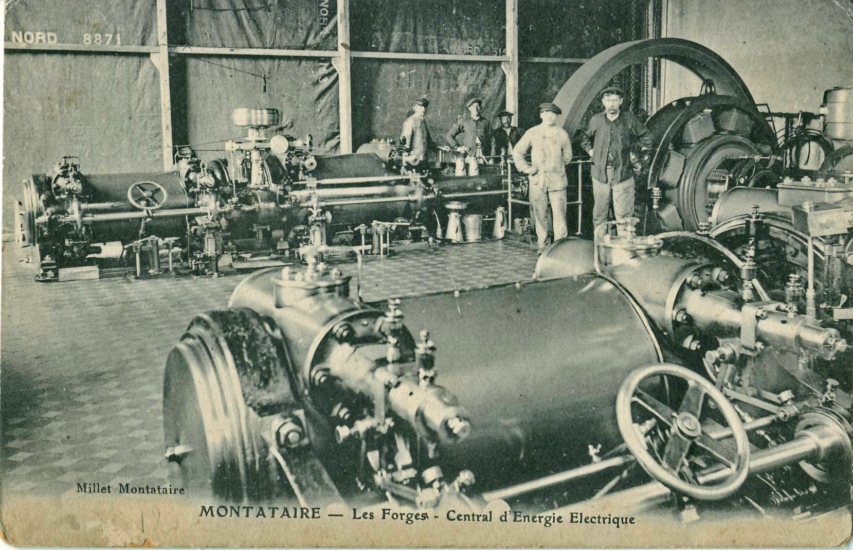 Carte postale ancienne éditée par Millet à Montataire MONTATAIRE - Les Forges - Central d'Energie Electrique. On distingue au second plan une machine à vapeur fixe dont le volant entraîne une génératrice, et, au second plan, une partie d'une seconde machine à vapeur